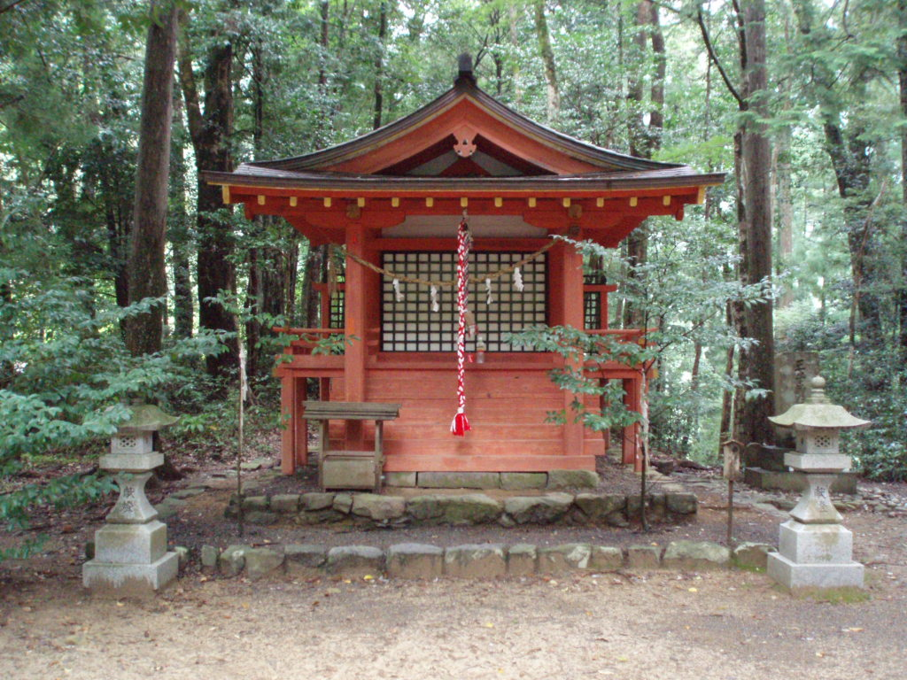 HOSSHINMON-oji